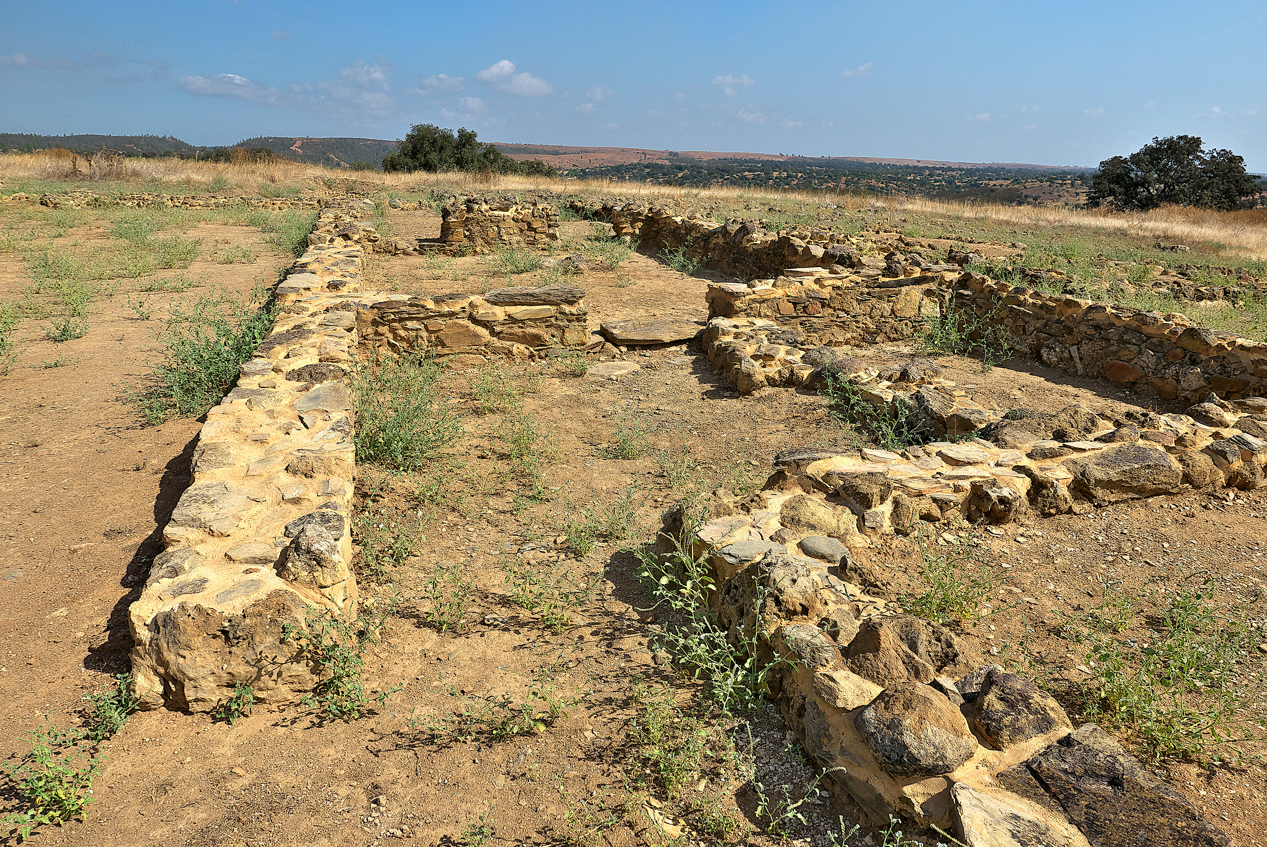 En el siglo VIII a.C. los tartessos buscaban la plata y el cobre en tierras onubenses.